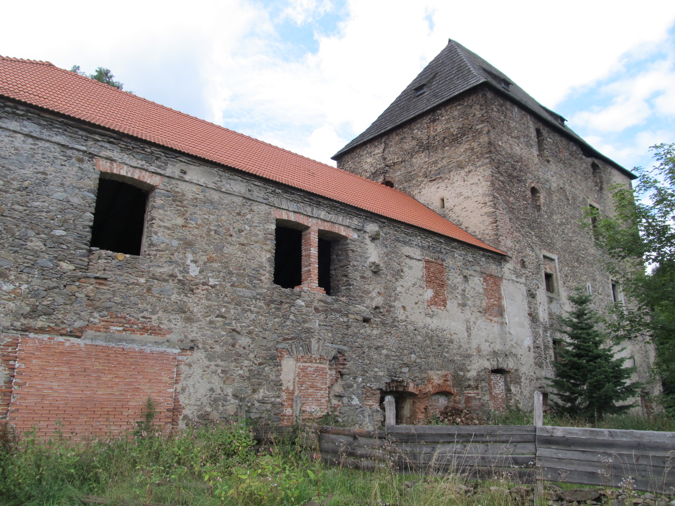 Čachrov - tvrz